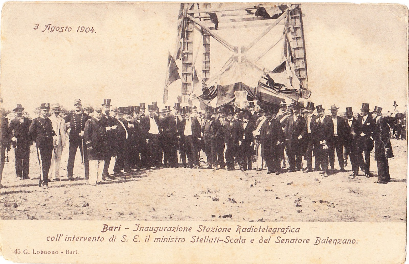 Bari - Inaugurazione Stazione Radiotelegrafica coll'intervento di S.E. il ministro Stelluti-Scala e del Senatore Balenzano